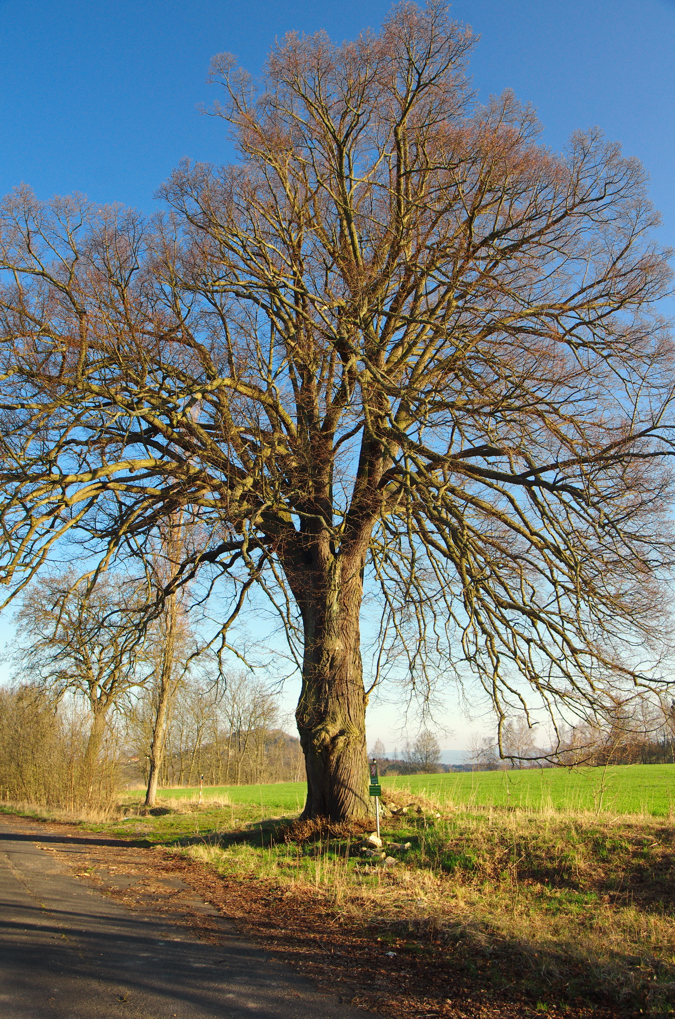 Památný strom Žalmanovská lípa, Žalmanov, okres Karlovy Vary